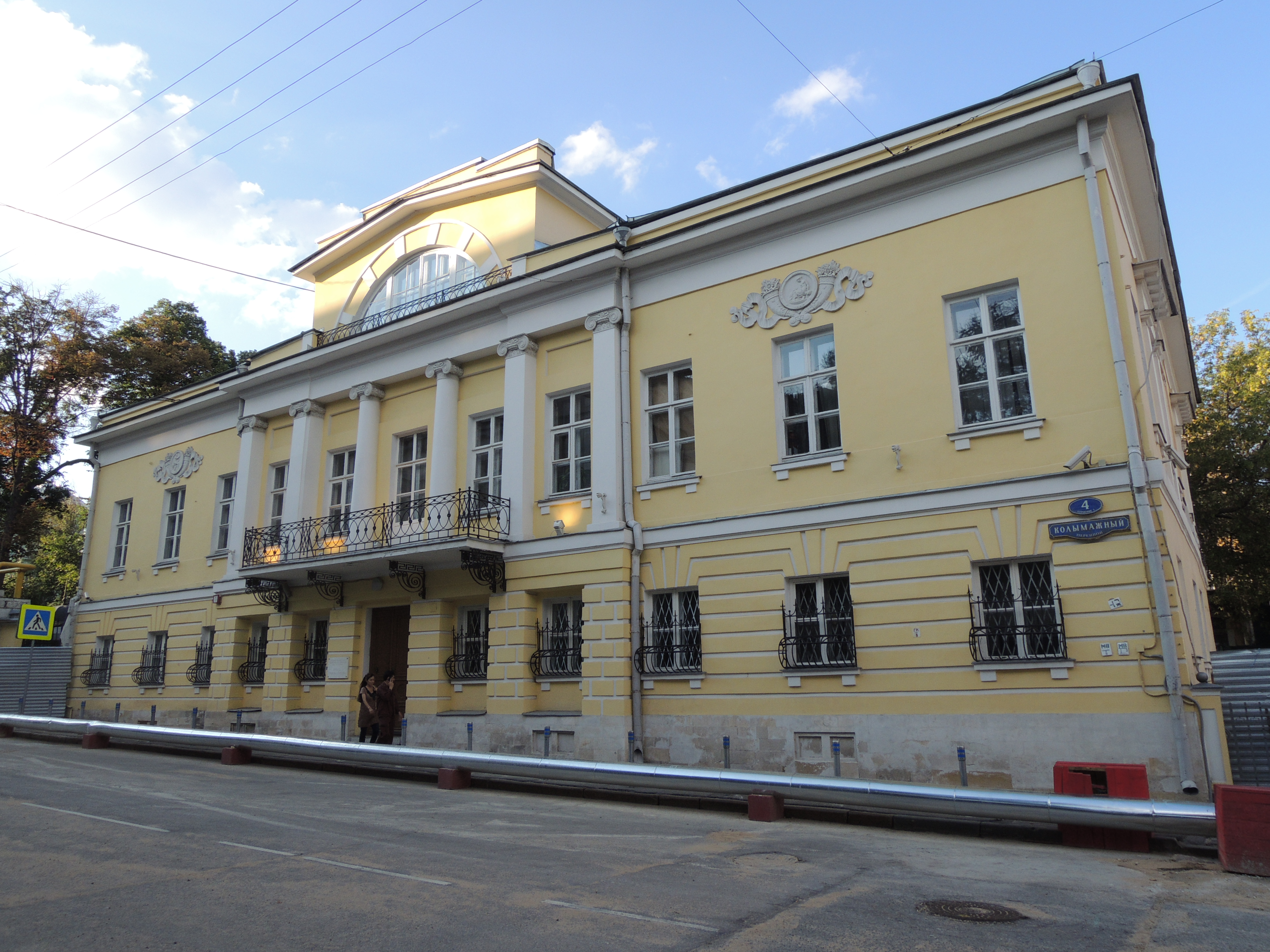 Музейный городок ГМИИ.